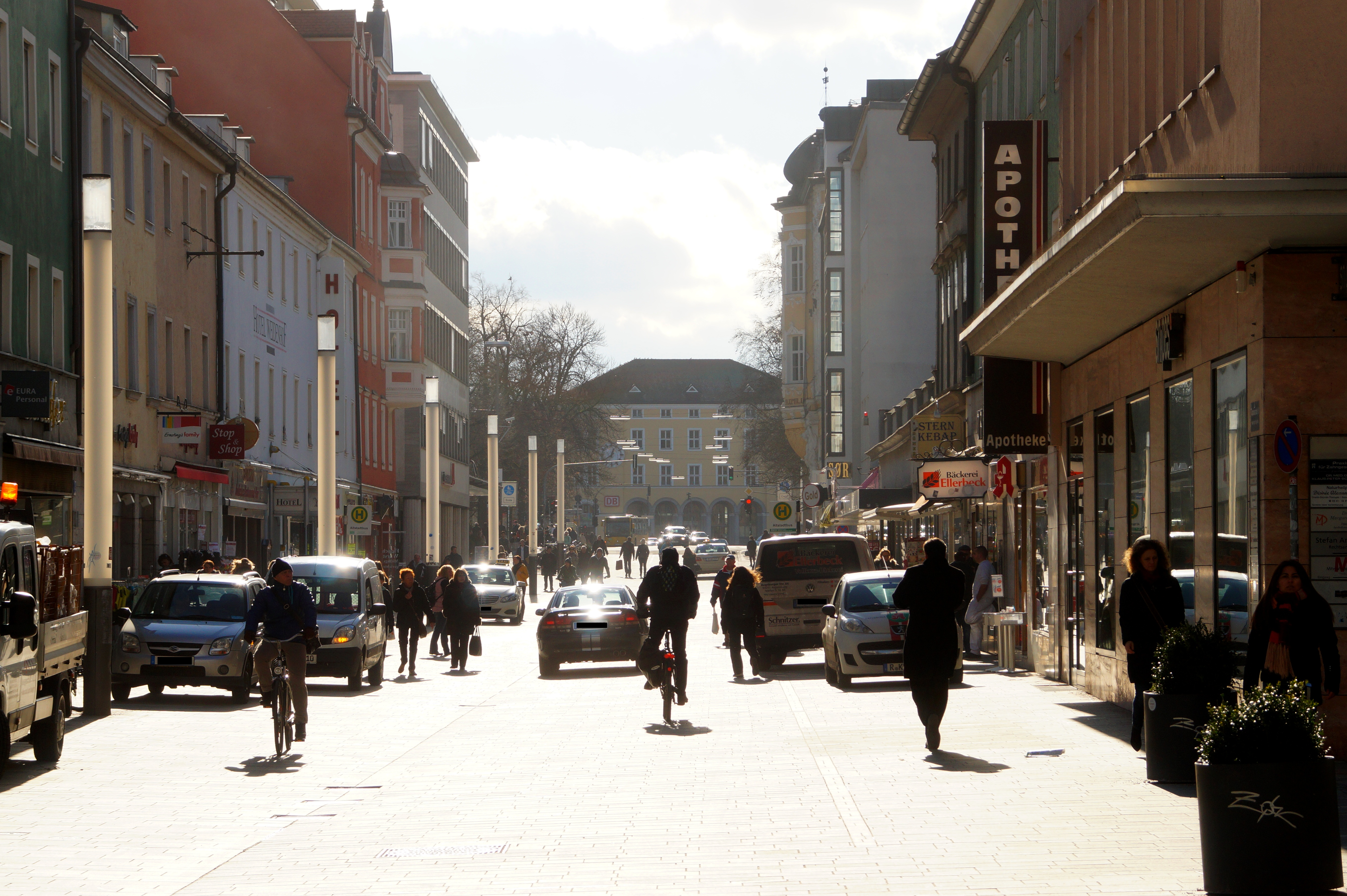 Regensburg, Germany. Südabschnitt Maximilianstraße mit Blick auf Bahnhof.